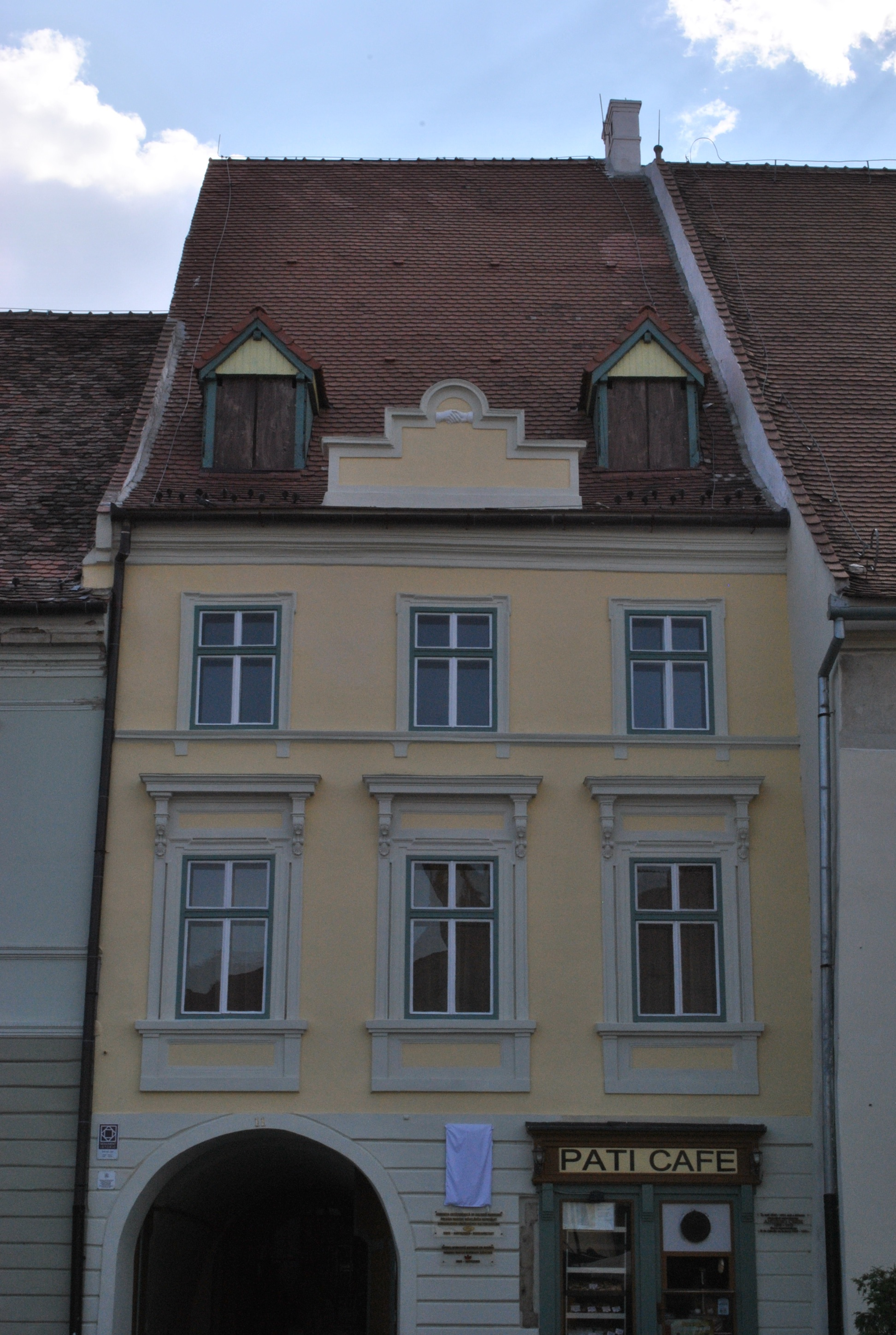 Casă, sec. XV - XIX